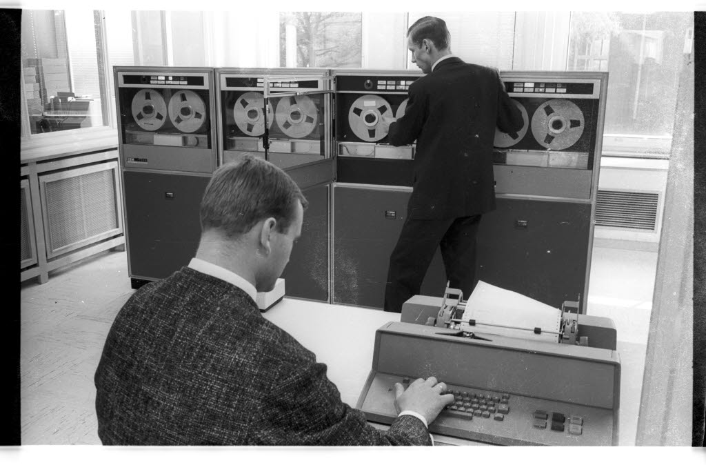 Elektronische Datenverarbeitungsanlage IBM 1401 bei den Stadtwerken in der Humboldtstraße zur Berechnung der Wahlergebnisse der Stadt Kiel zur Bundestagswahl 1965.